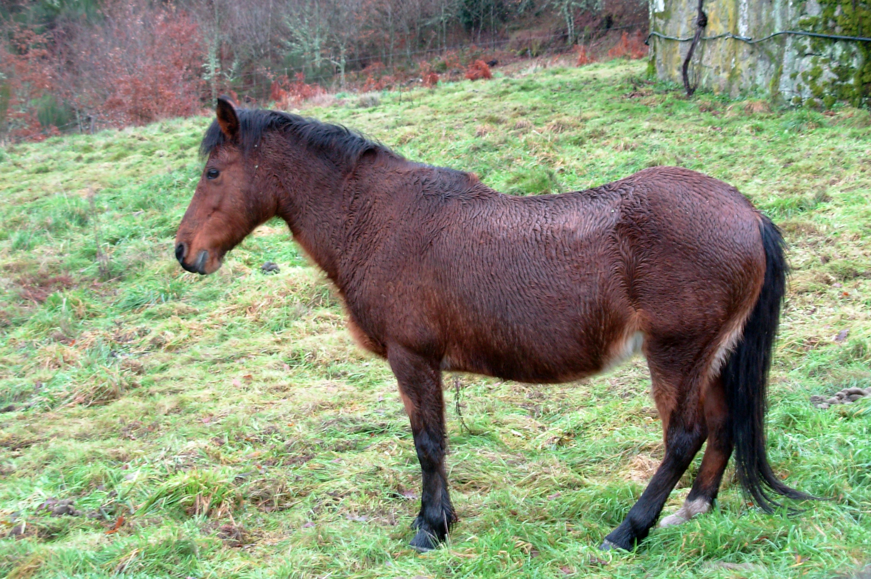 Garrano. Lugar de Podre, Castro Laboreiro, Melgaço, Viana do Castelo, Portugal.